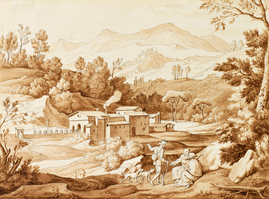 Landschaft mit Burgen, im Vordergrund ein Kloster. Sepiaaquarell über Bleistift, Rudolf Wiegmann zugeschrieben.